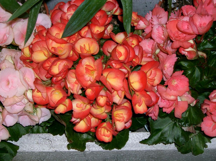 Begonia